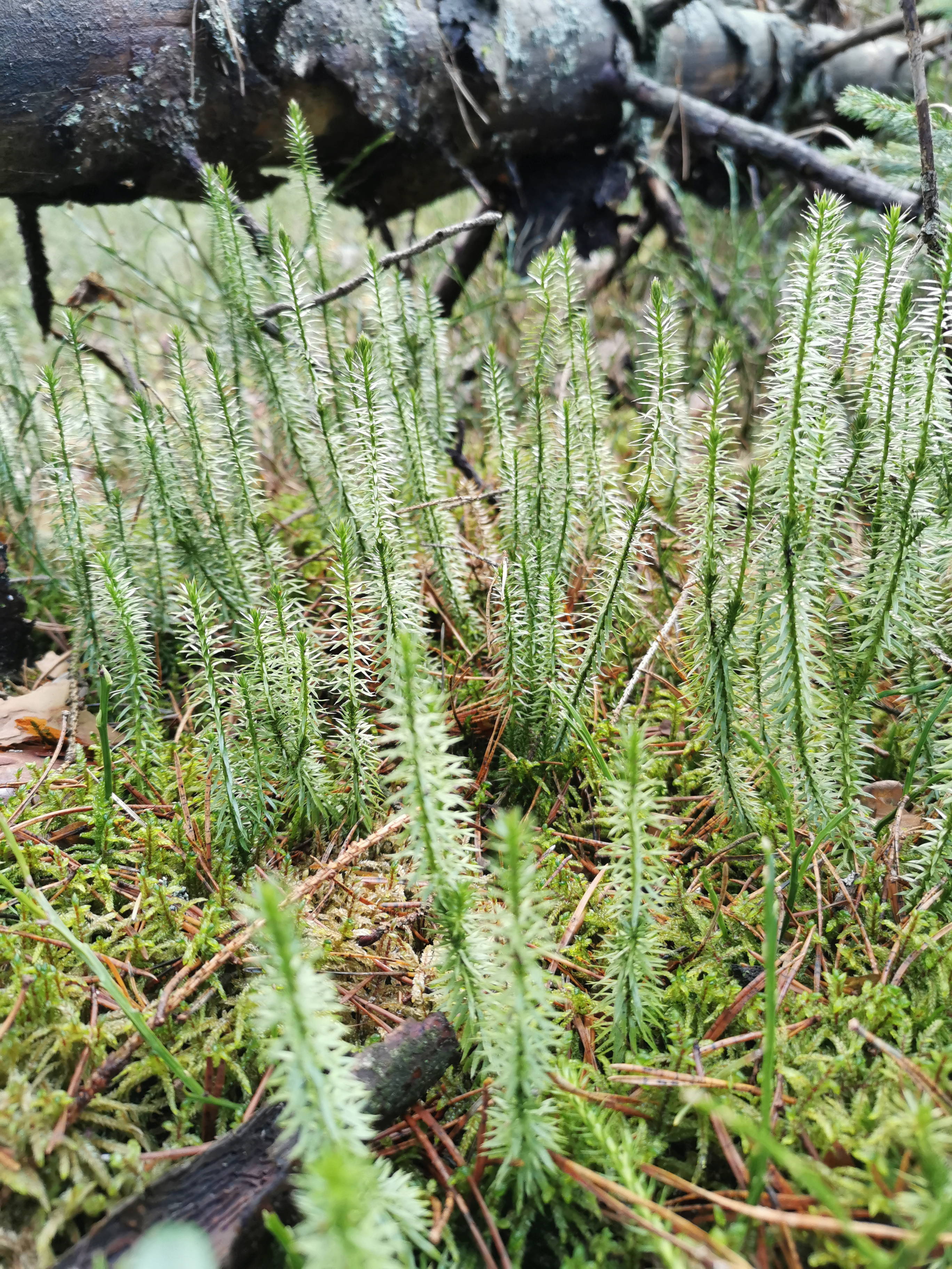 Torfowisko Wieliszewo 2 w gminie Dębnica Kaszubska